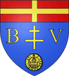 armes héraldiques de la commune de Brouvelieures